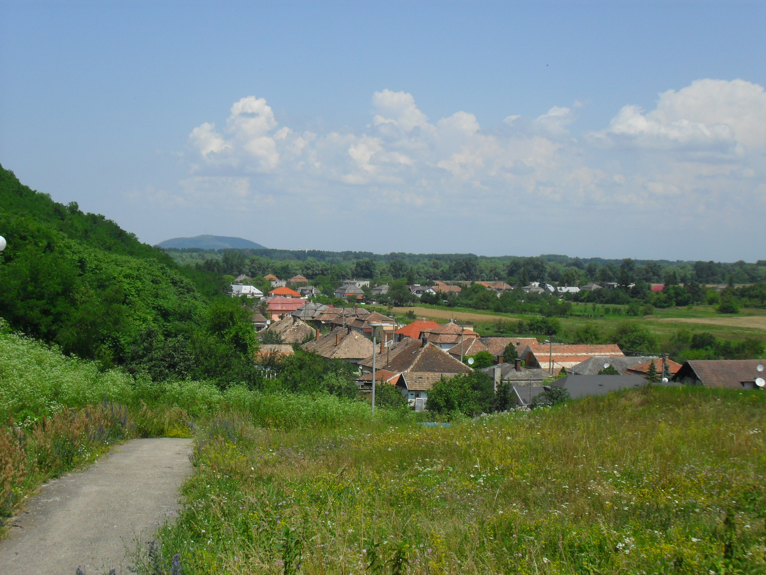 Szomotor - Bodrogvécs látképe a temetődombról